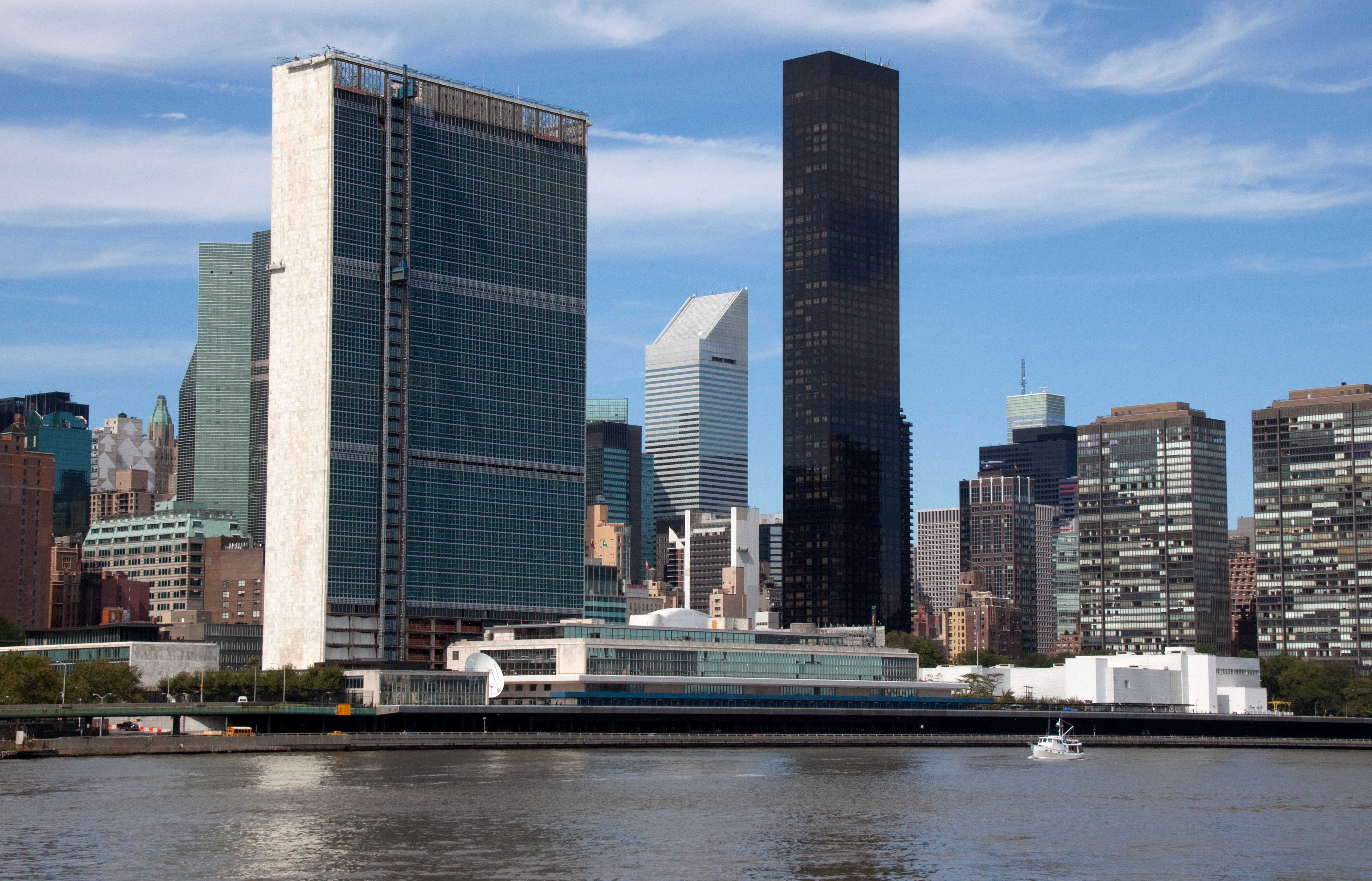 UN Building 2